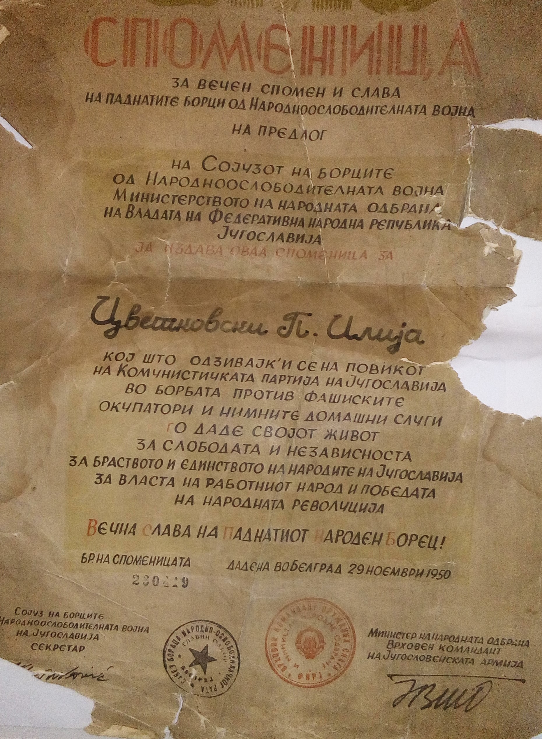 Споменица на паднатите борци од НОВ